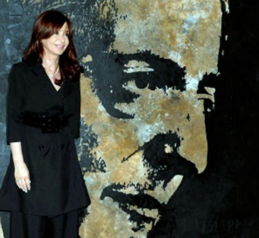 Cuadro Obsequiado a la presidenta Cristina Fernandez de Kirchner por el artista Norberto Filippo. Pintado con oleo y vino Malvec.